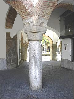 Vara de medir de Zafra